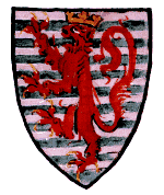 Lucemburský erb